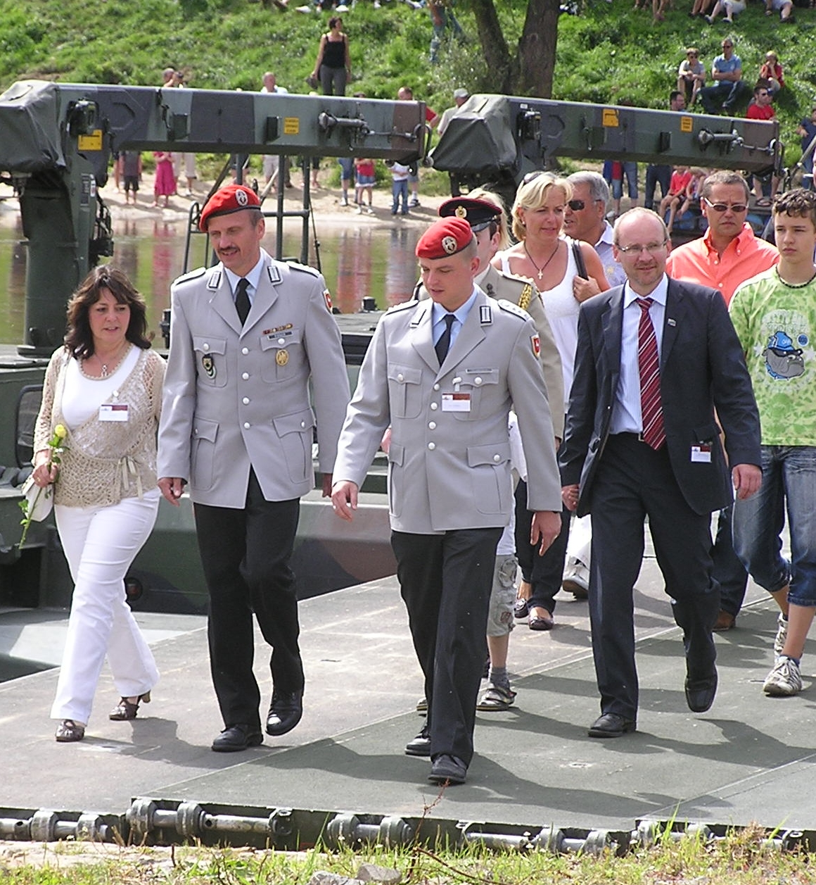 Schlacht bei Minden, 250 jährige Jubiläum, Brückenbau, Ehrengäste überschreiten auf einer pioniermäßig erbauten Schwimmbrücke die Weser, darunter u.a. Oberst Wolfgang Pirner, Regimentskommandeur des Pionierregiments 100 und der Bürgermeister Mindens, Michael Buhre.